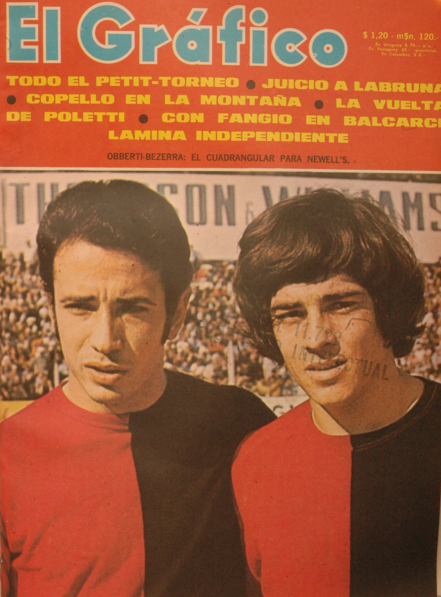 El Grafico del 04 de Agosto de 1970. Edicion 2652